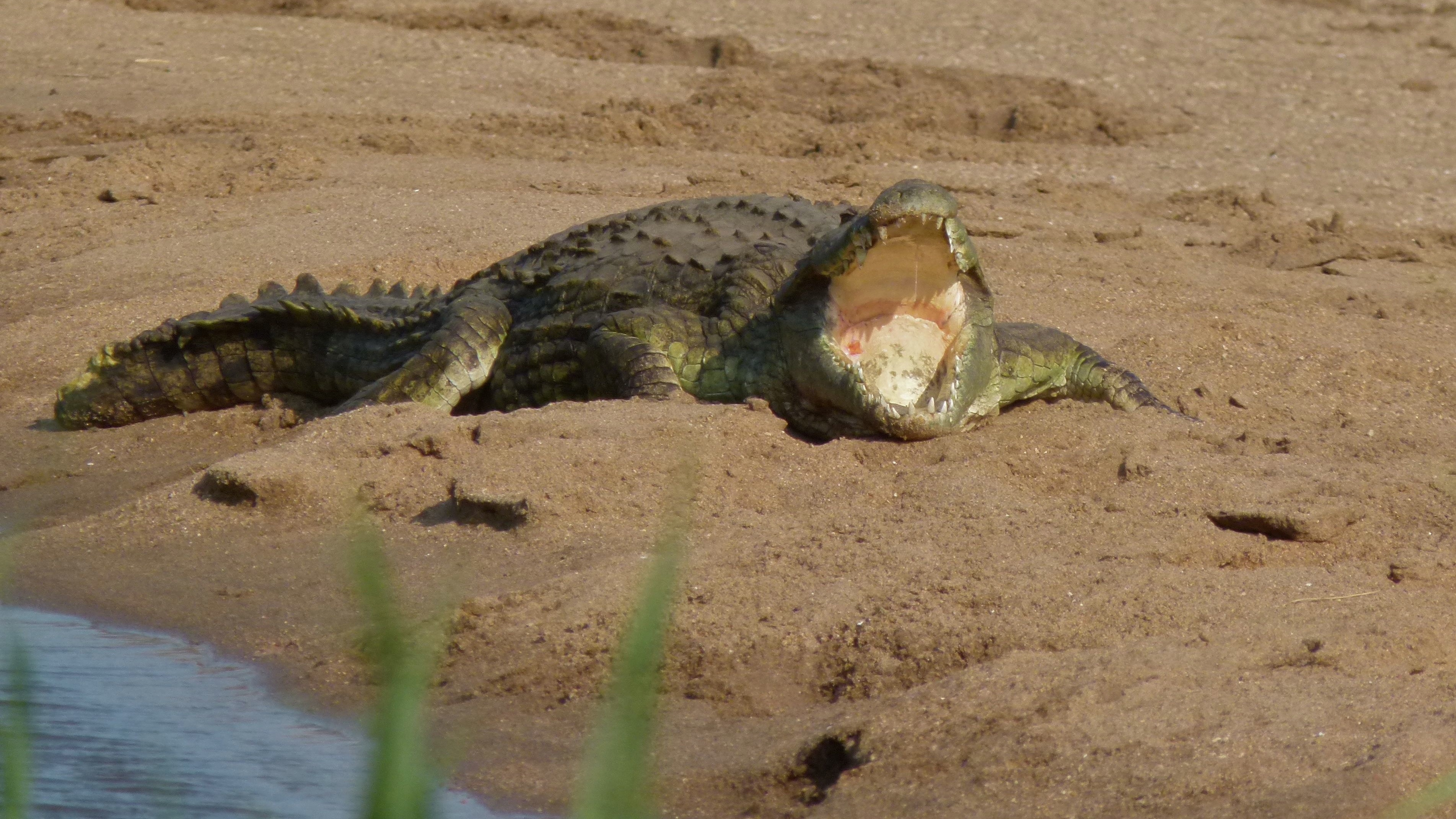 S135 near Shingwedzi, Kruger NP, SOUTH AFRICA